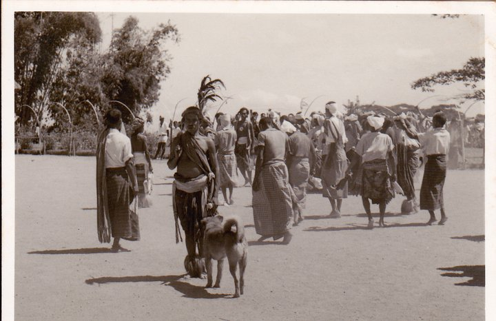 Um morador,muita dança e um característico cão de Timor